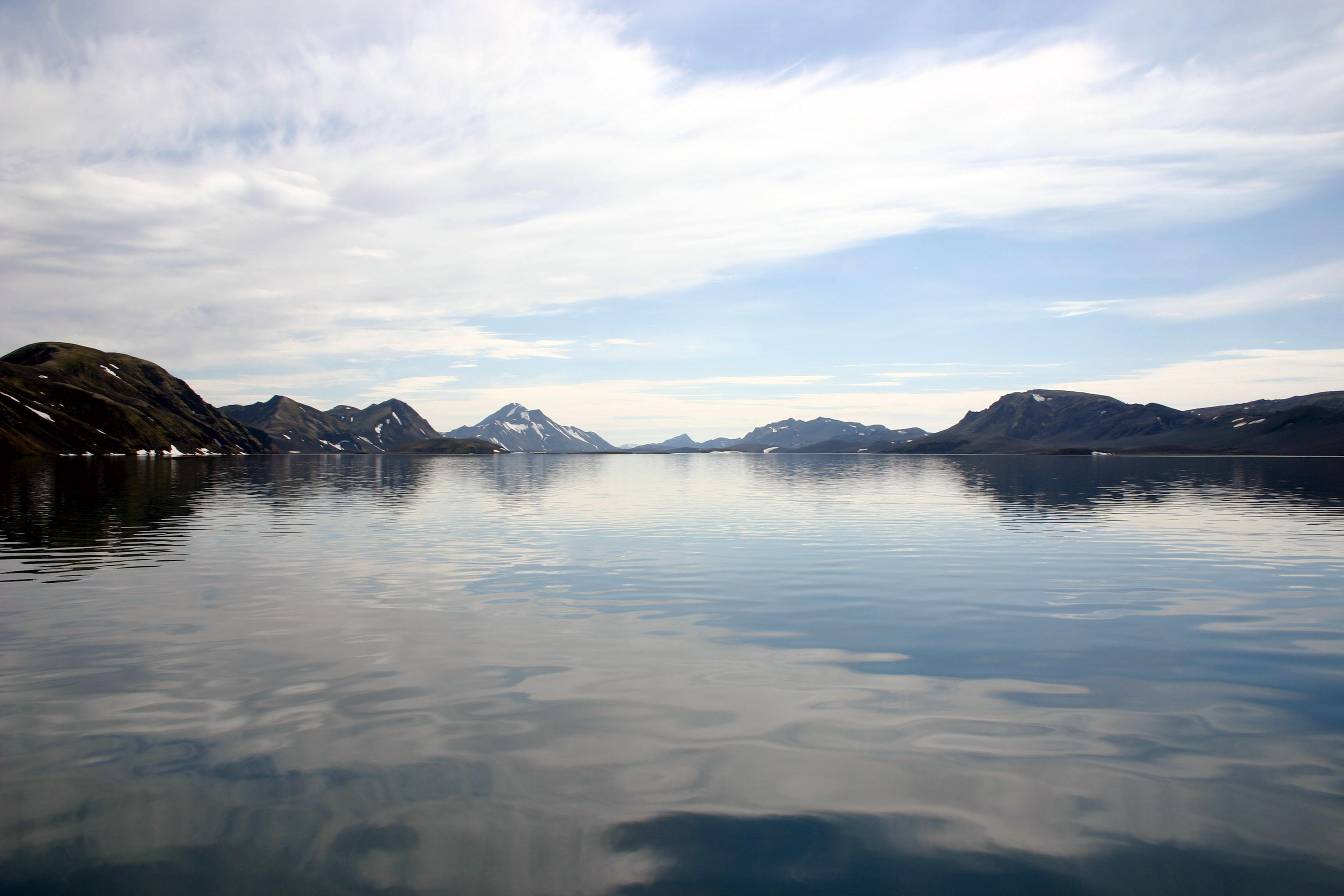 Langisjór, Iceland, 20060625